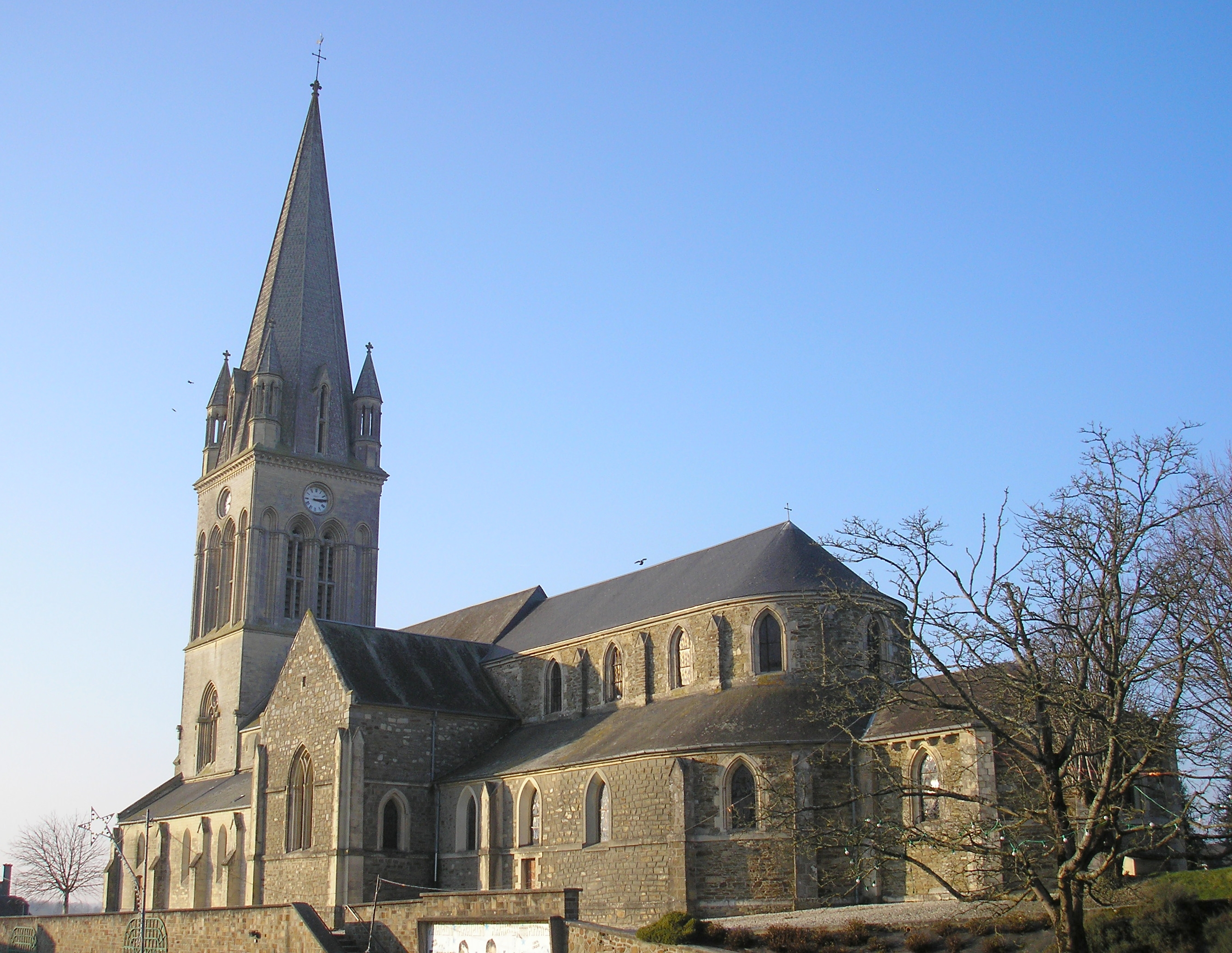 Marigny (Normandie, France). L'église.